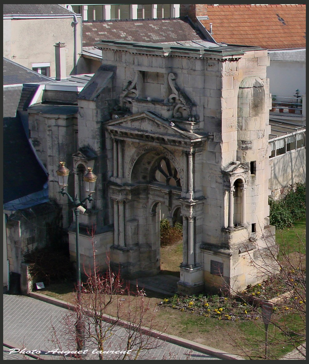 Le Portail Saint-Martin a été édifié en 1540. Il est attribué au sculpteur rémois Pierre Jacques. Le Portail fermait à l'origine le bas-côté de l'église Saint-Martin. De style renaissance, le portail est l'un des monuments les plus anciens d'Epernay. .